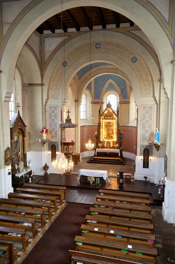 Pohled na čelo kostela